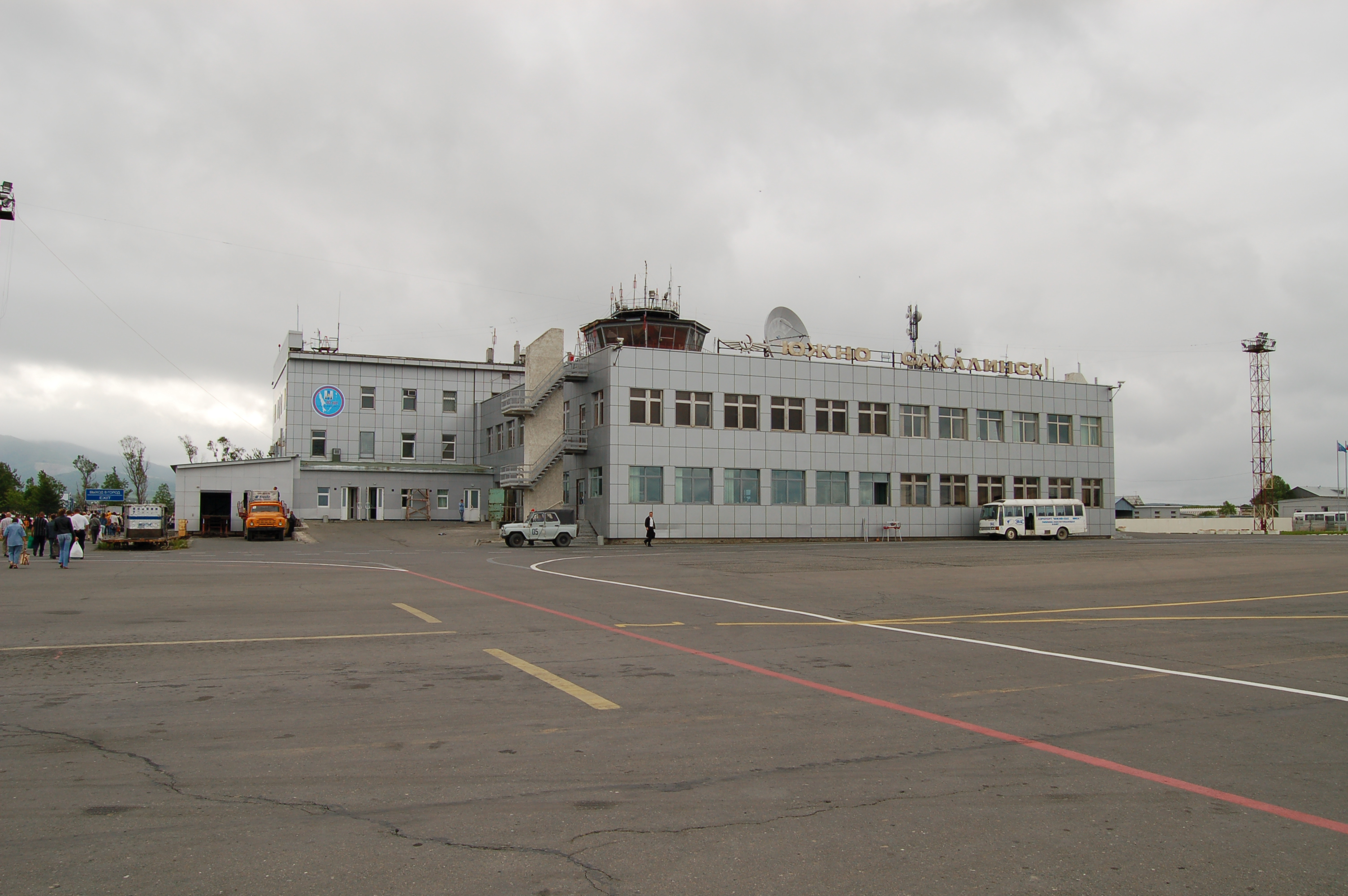 Yuzhno-Sakhalink Airport